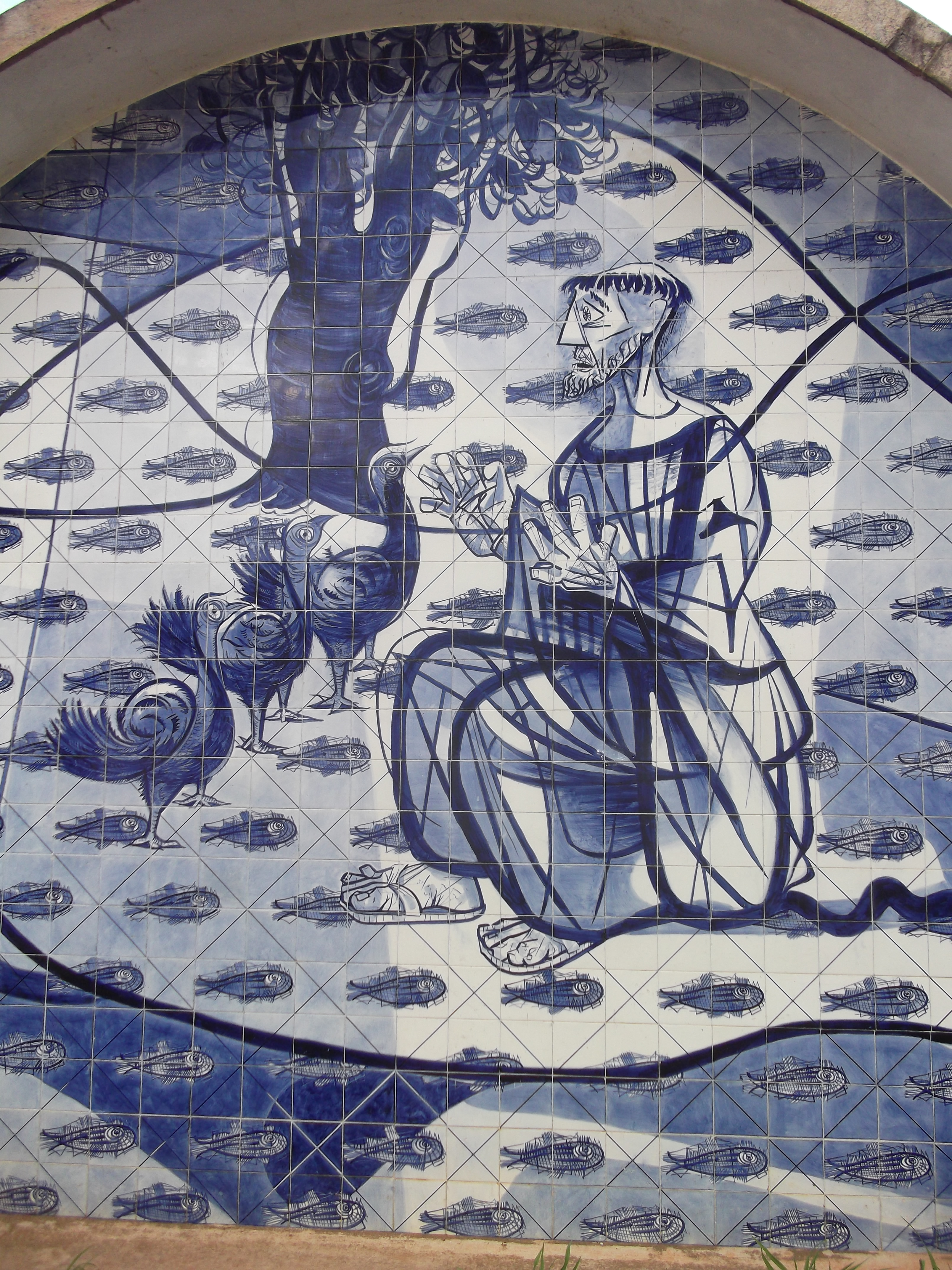 Igreja São Francisco na Pampulha